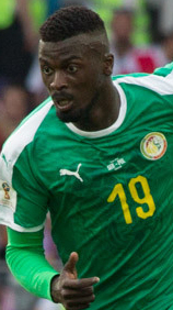 Польша неожиданно проиграла Сенегалу